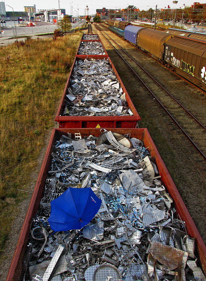 Järnvägsvagnar med metallskrot. Ystads rangerbangård 15 okt 2015.